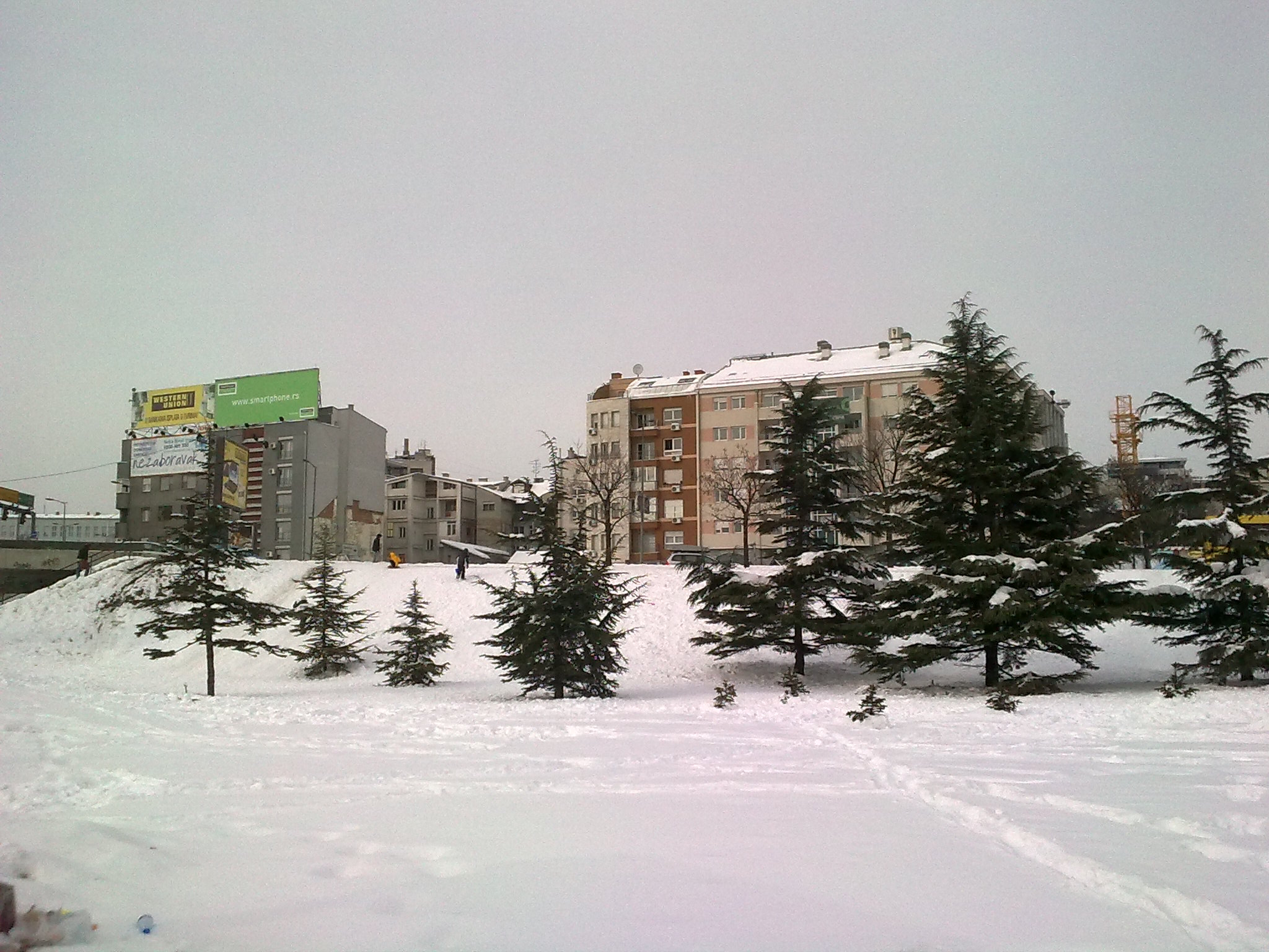 Зимски призор у близини Аутокоманде у Београду, сликано са ап.